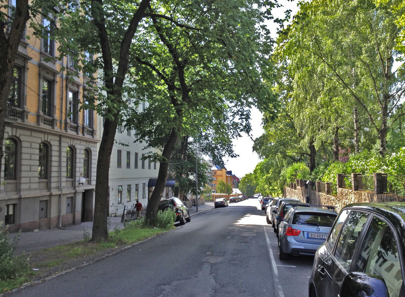 Frederik Stangs gate i Oslo